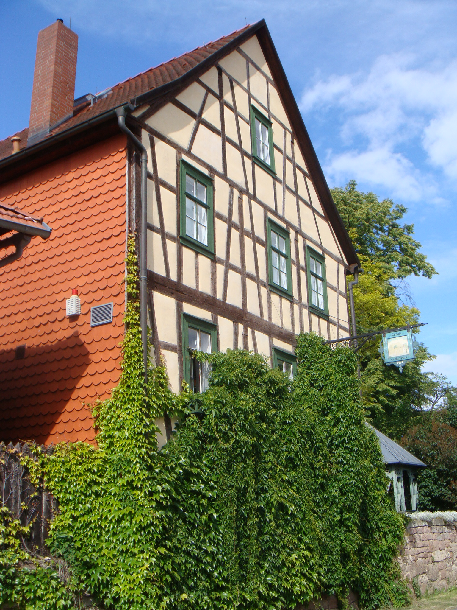 Einkehr zur alten Pfarre